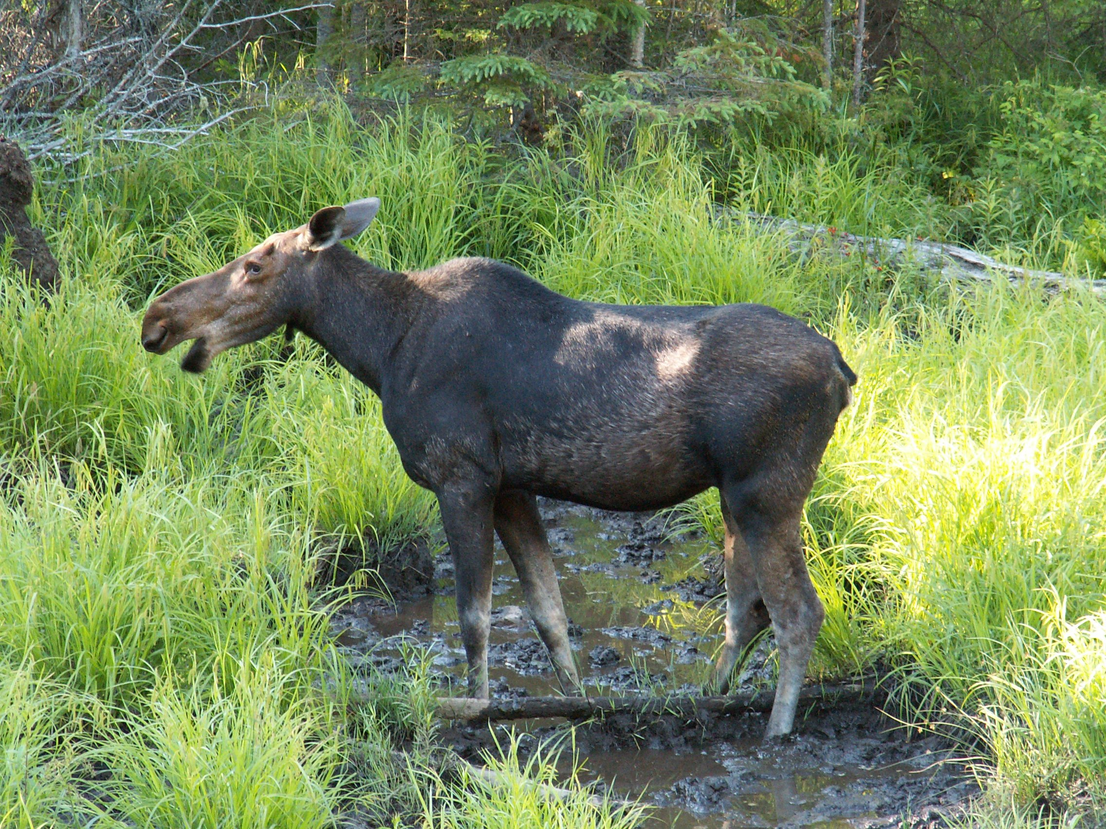 Elch (Alces alces/Unterart:Alces alces americanus) im Algonquin Provincial Park Ontario Kanada. Foto selbst gemacht.